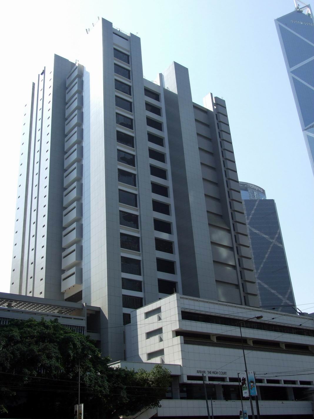 香港高等法院